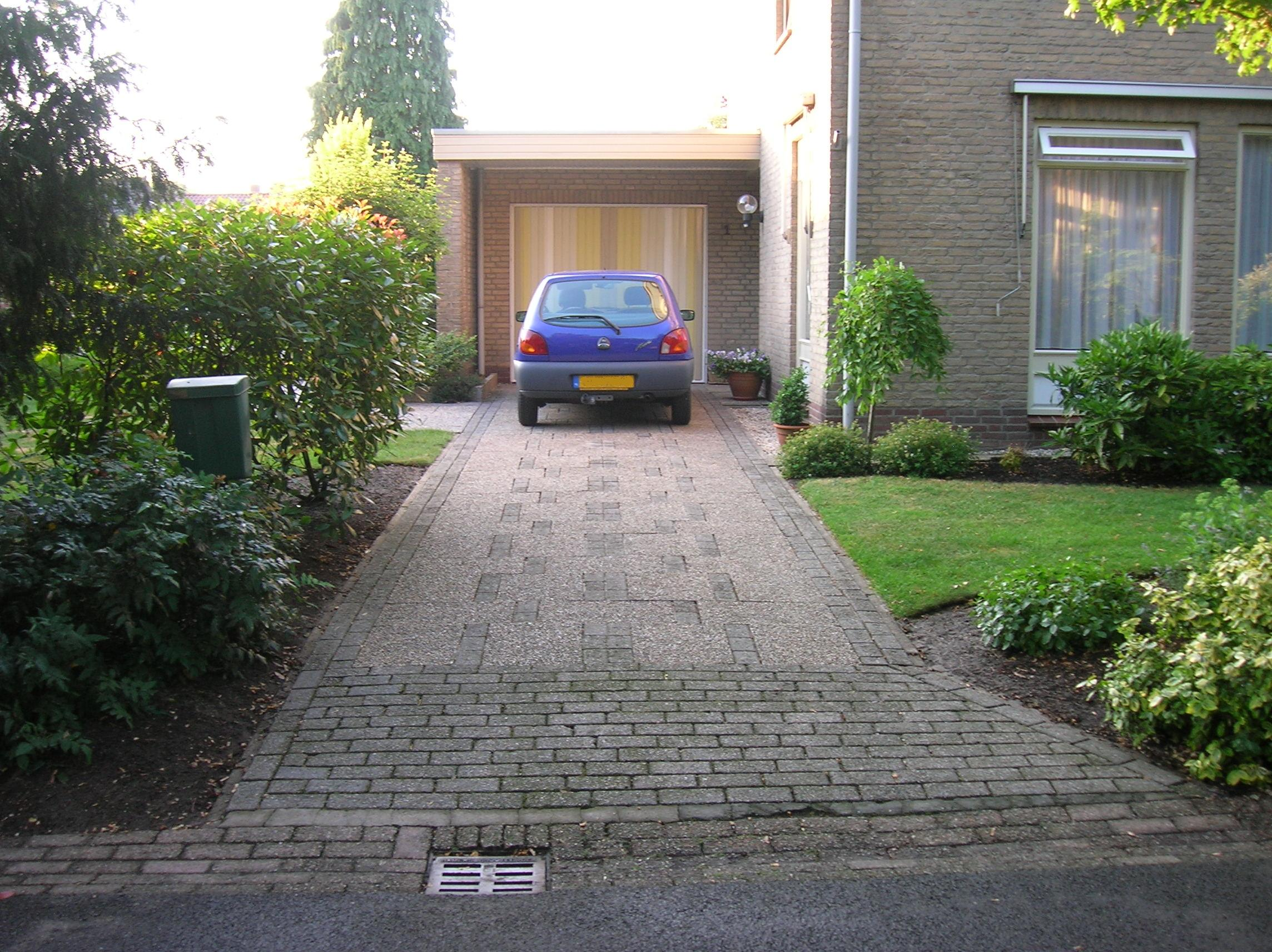 Zelfgemaakte foto, 11 juli 2006: Een oprit van een woonhuis. Voor publicatie eerst bewerkt (23 juli 2006) in Paint: kenteken onherkenbaar gemaakt.